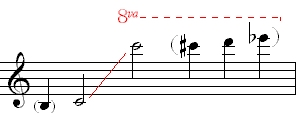 Обим звучности флауте